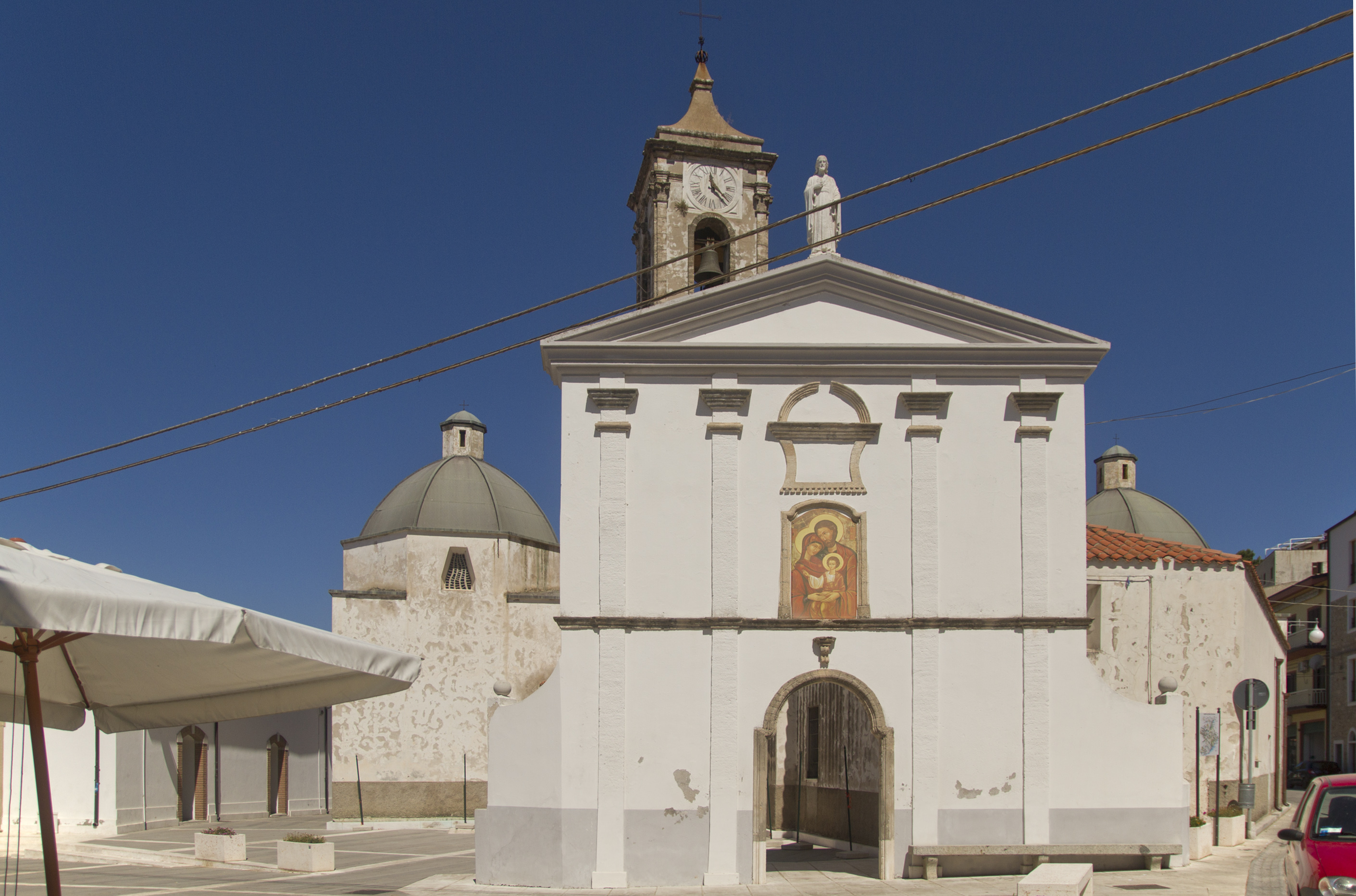 Chiesa Parrocchiale Di San Nicola, Baunei OG, Sardinia, Italy